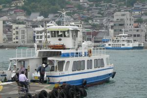 画像